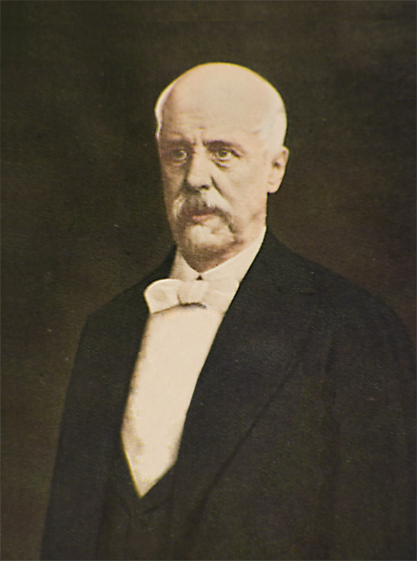 Joaquín García Icazbalceta